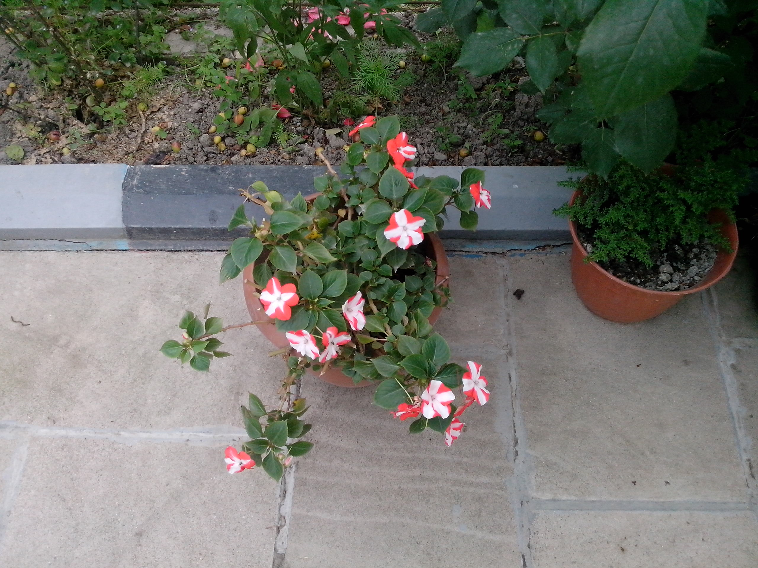 Quba rayonunun Atuc kəndində gül baxçası